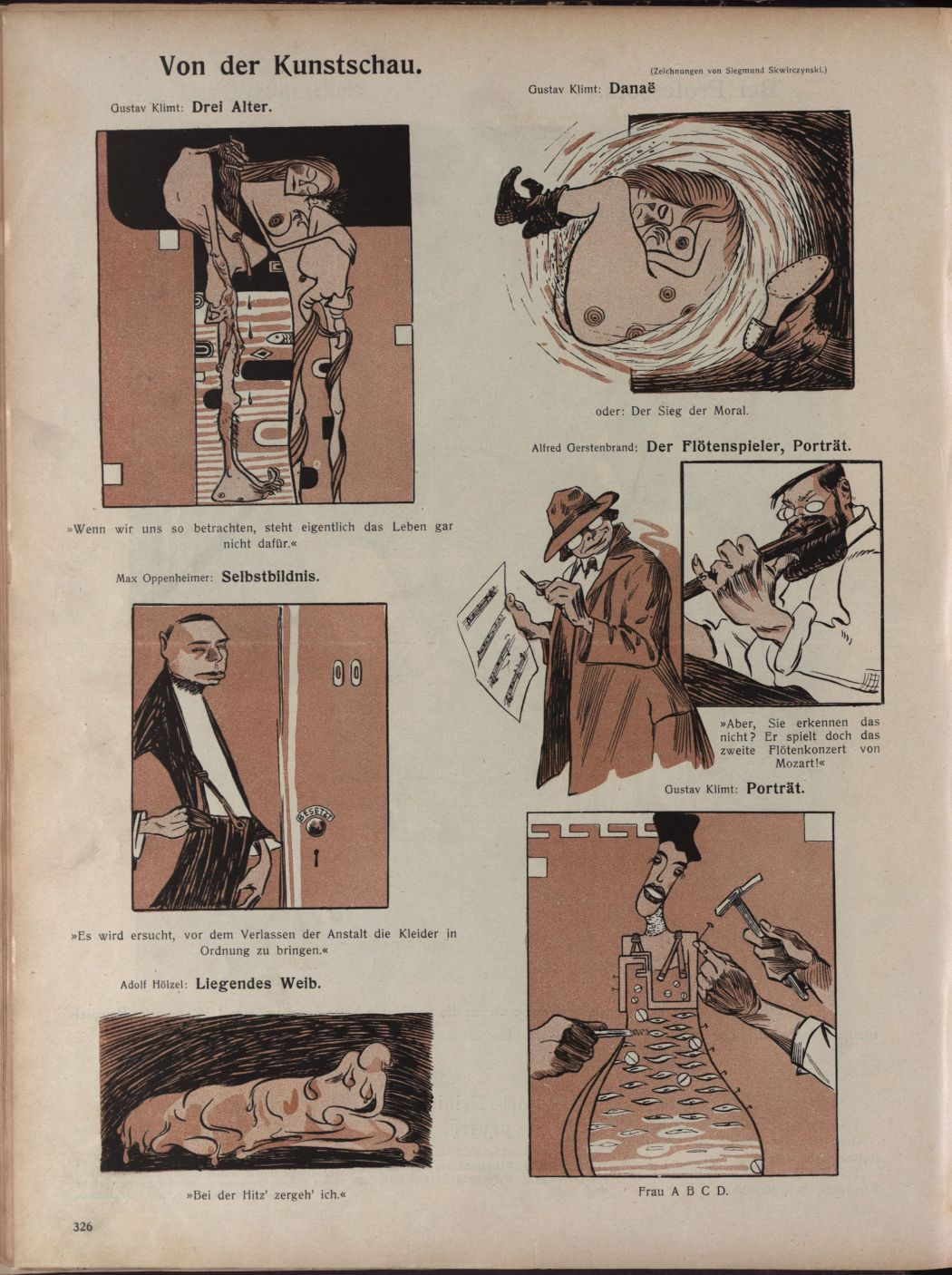 Zygmunt Skwirczyński Karikaturen über die Kunstschau Wien 1908 in Die Muskete, 2. Juli 1908